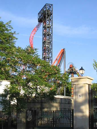 Attractions of Parque de Atracciones de Madrid, in Spain